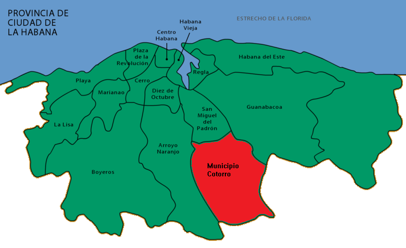 Mapa de la Habana